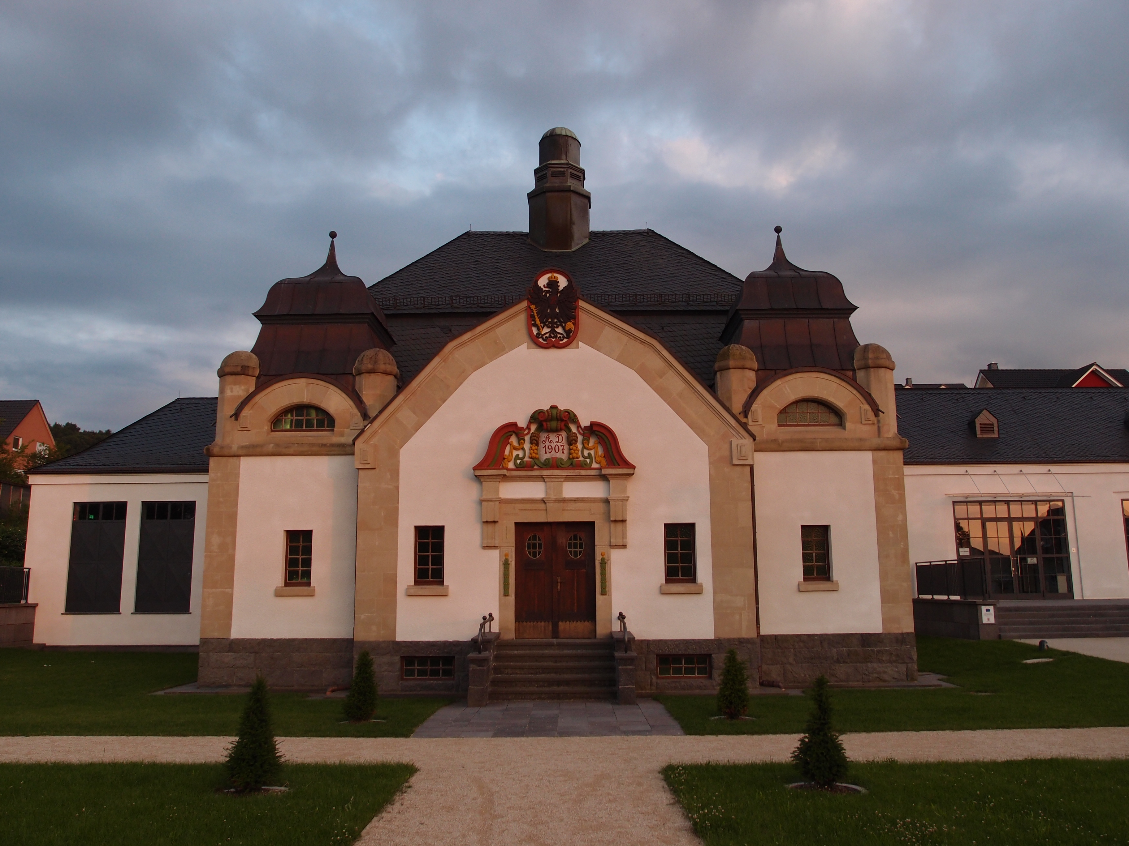 Brunnentempel der Mineralquelle in Selters (Taunus), Ortsteil Niederselters